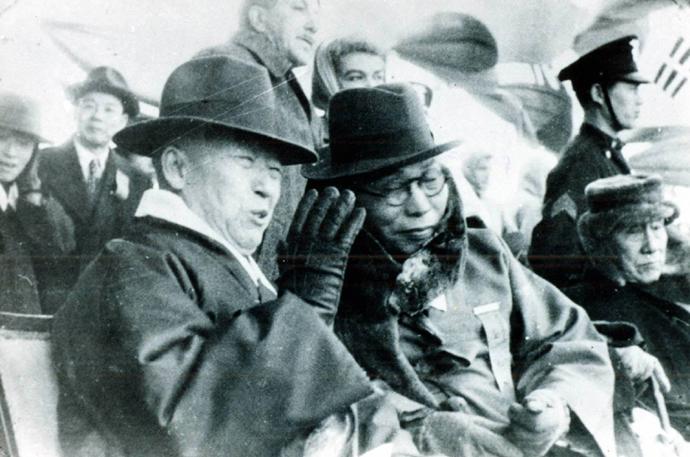 임시정부 요인 환영회에 참석한 이승만과 김구